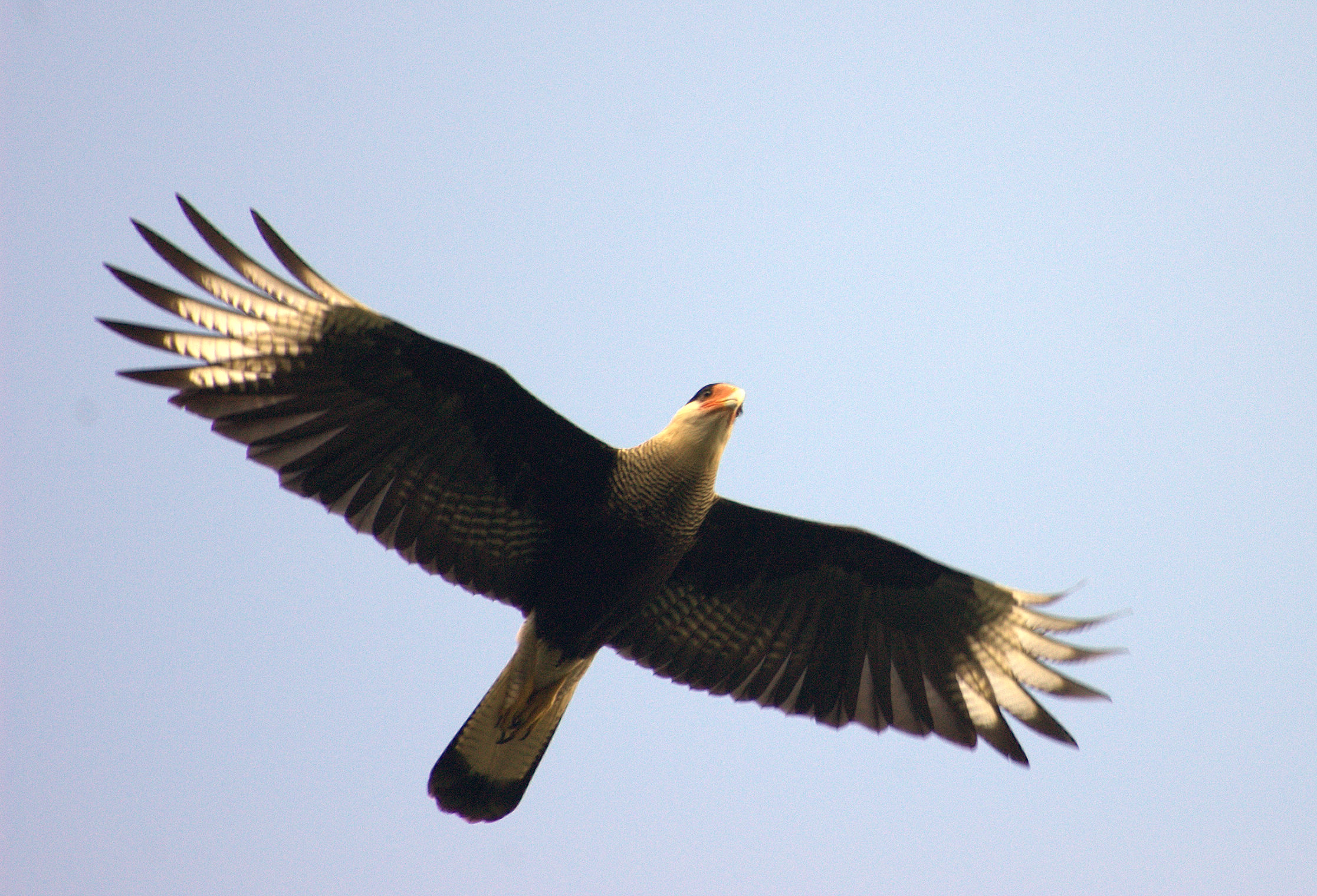 Caracara plancus Horto Florestal de São Paulo